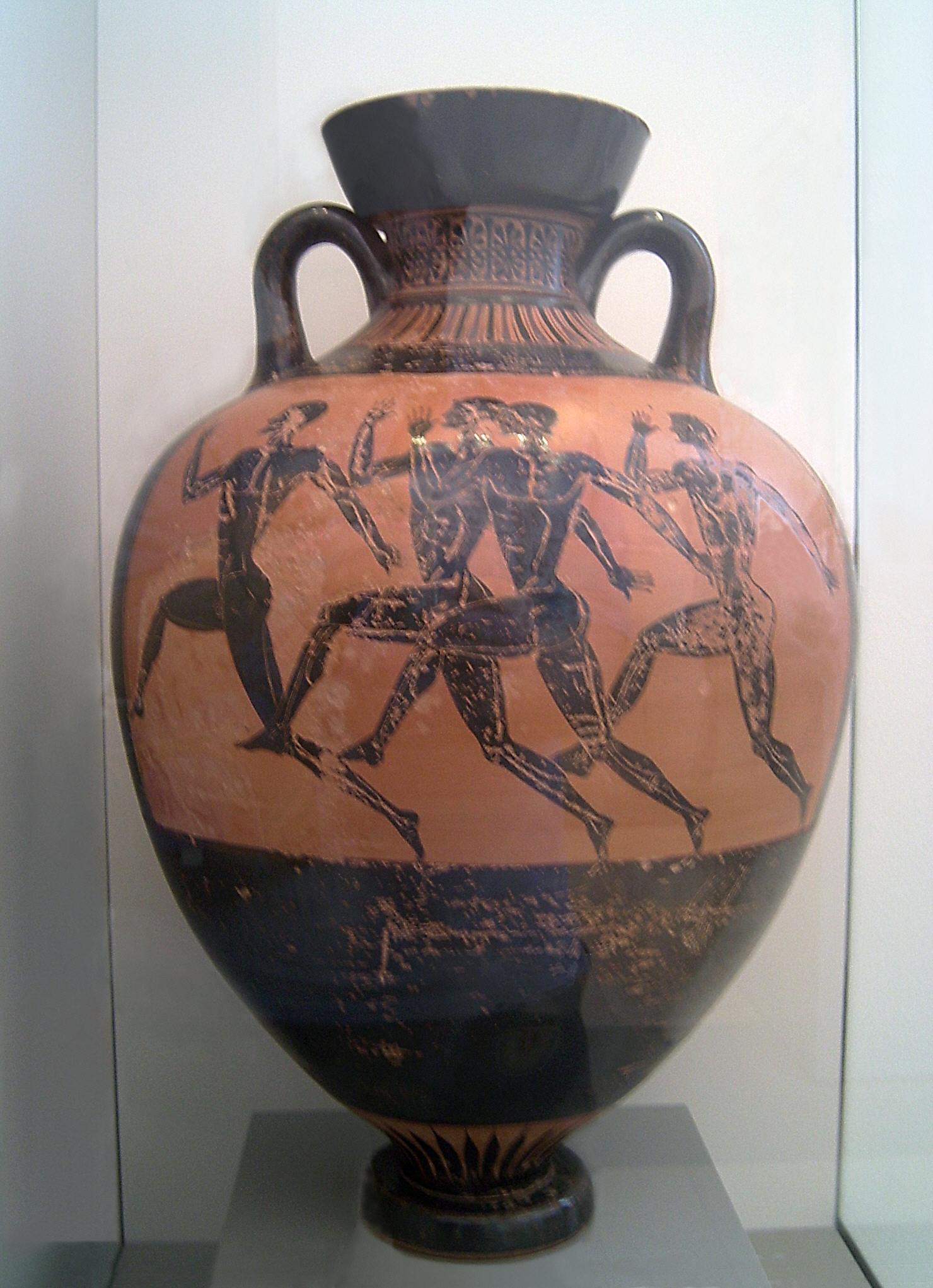 Wettlauf auf einer Panathenäischen Preisamphora, dem Berliner Maler zugeschrieben, 480-470 v. Chr., gefunden in Nola.